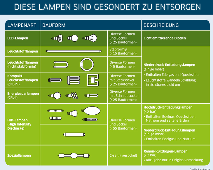 Das Rücknahmesystem für LED- und Gasentladungslampen erfasst folgende Produktgruppen: Stabförmige Leuchtstofflampen Kompaktleuchtstofflampen Entladungslampen, einschließlich Hochdruck-Natriumdampflampen und Metalldampflampen Niederdruck-Natriumdampflampen und LED-Lampen (sog. Retrofit)